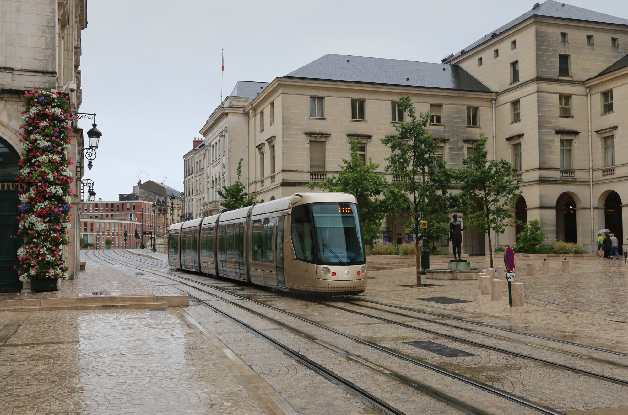 Tramway d'Orléans